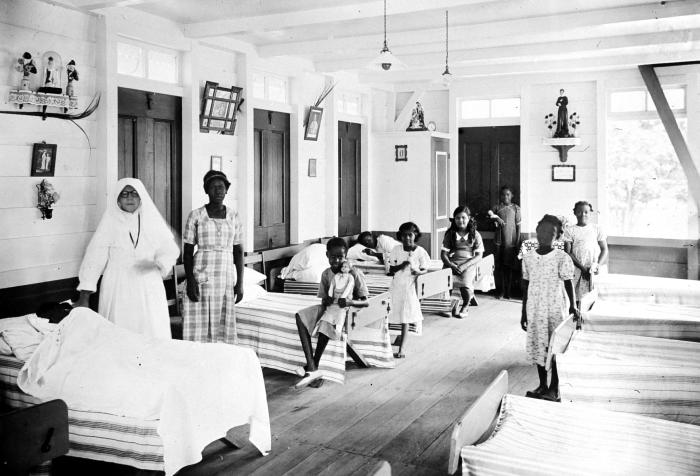 Repronegatief. Meisjes slaapzaal van de melaatsen stichting Sint Gerardus Majella van de rooms-katholieke missie te Suriname